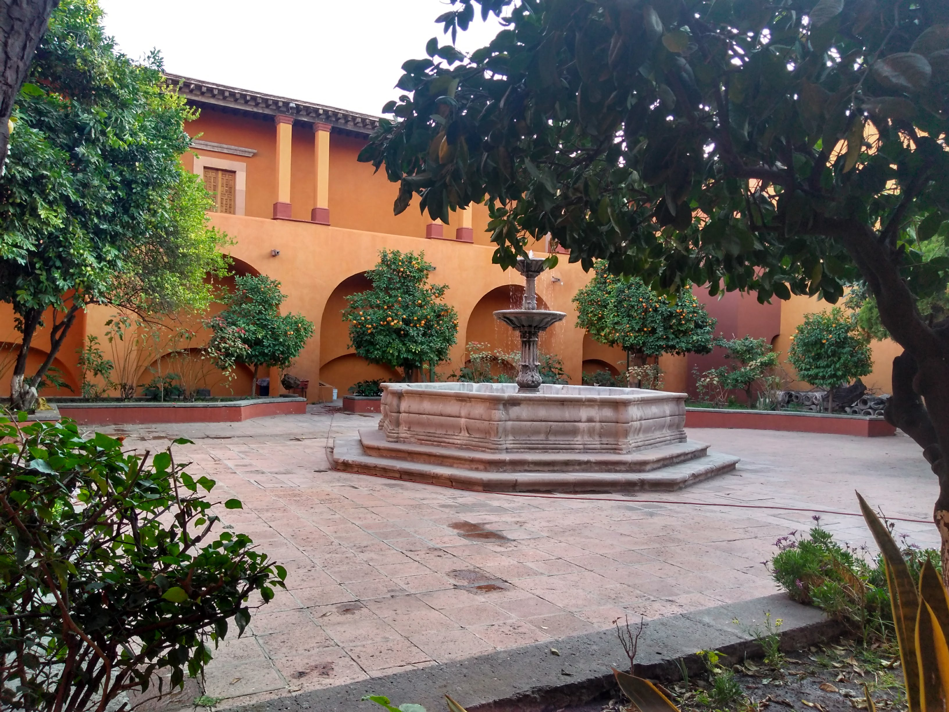 jardín en Templo y exconvento de San Agustín de Querétaro